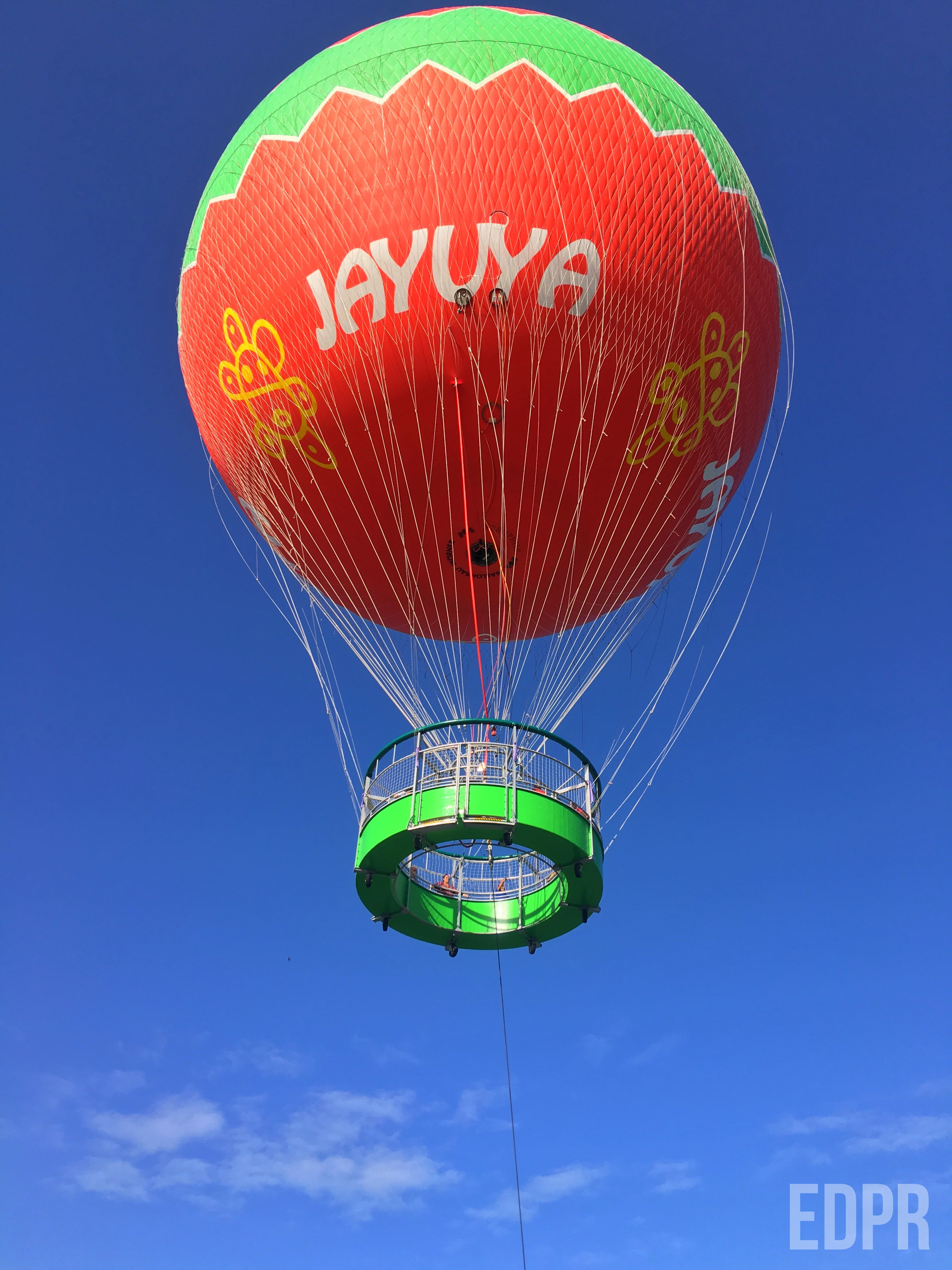 Una experiencia hecha aventura